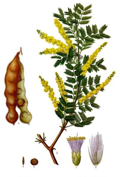 Arabischer Gummibaum. A blühender Zweig, nat. Grösse; 1 Blüthe, vergrössert; 2 dieselbe im Längsschnitt, desgl.; 3 geöffnete Hülse, nat. Grösse; 4 u. 5 Samen von verschiedenen Seiten, desgl.